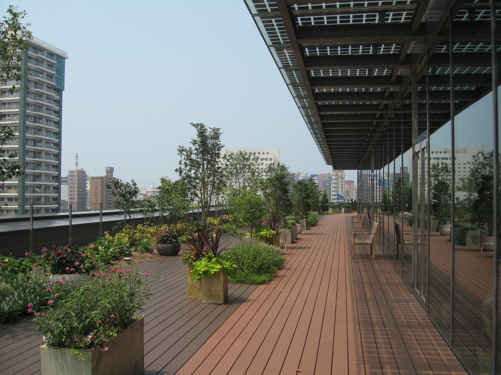 新潟市中央区。新潟日報メディアシップ4階の緑の広場。